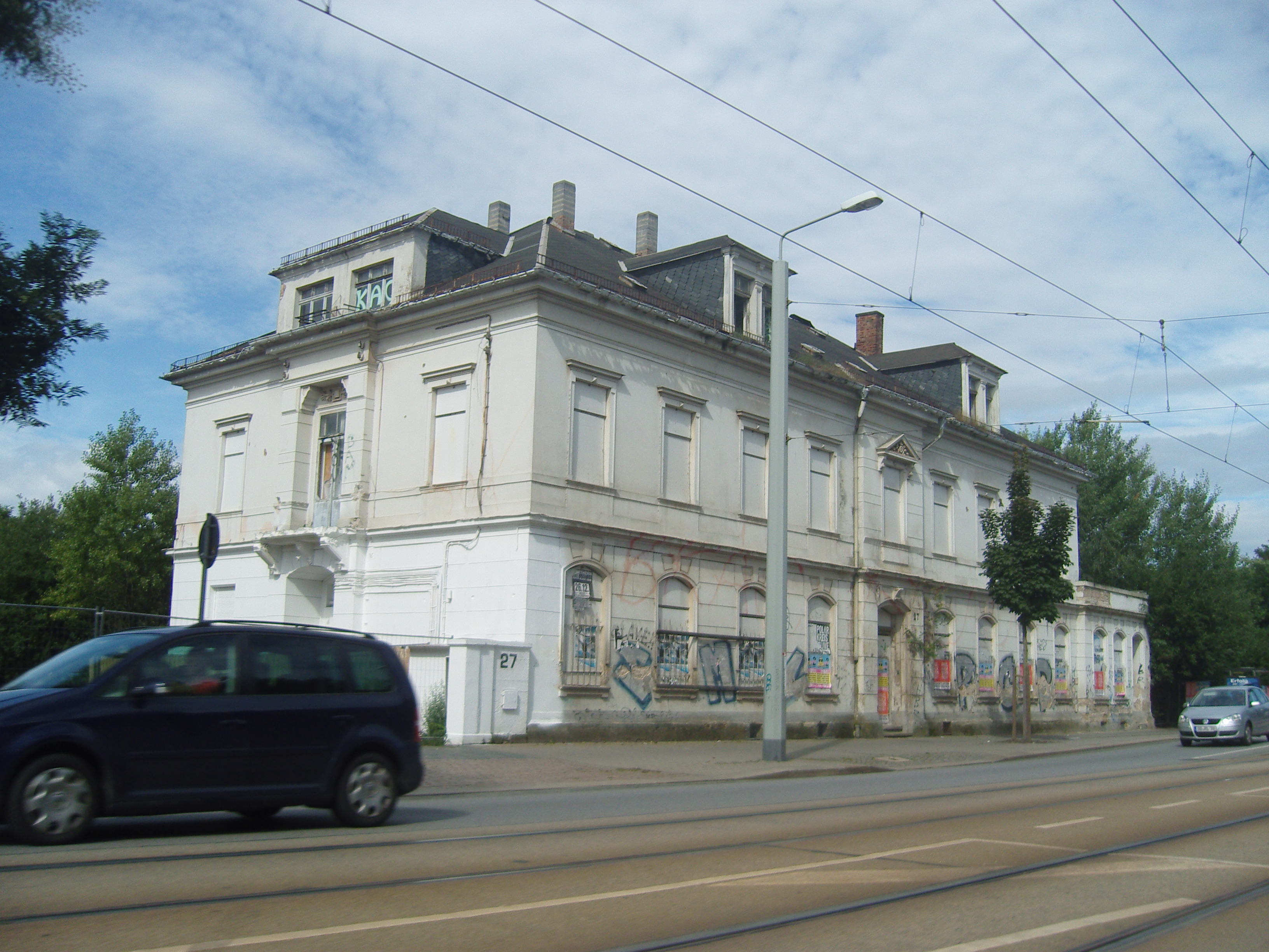 Denkmalgeschützte ehem. Dampfschiffs-und Maschinen-Bauanstalt in Leipziger Straße 27 in Dresden